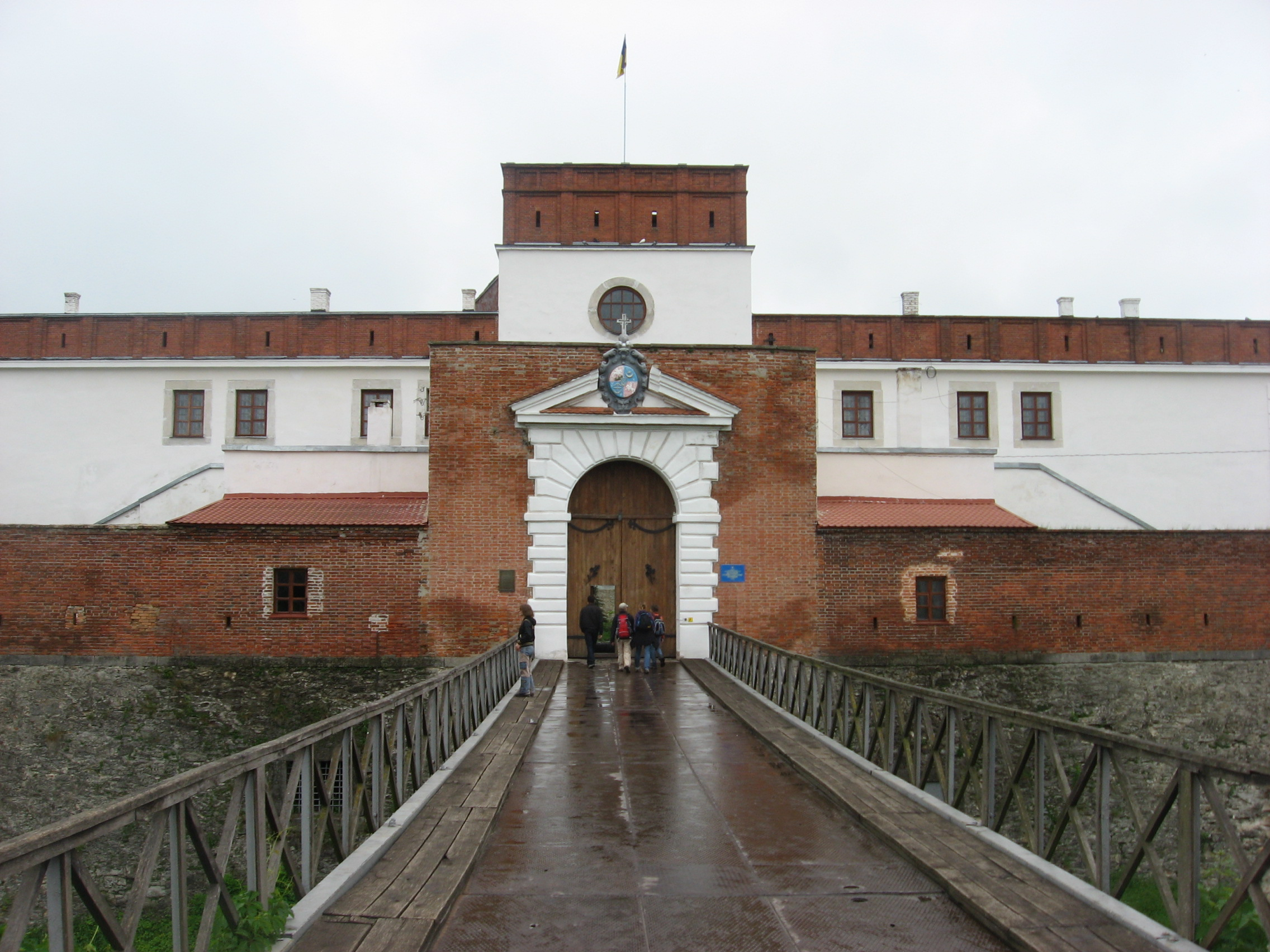 Надбрамний корпус замку в Дубно